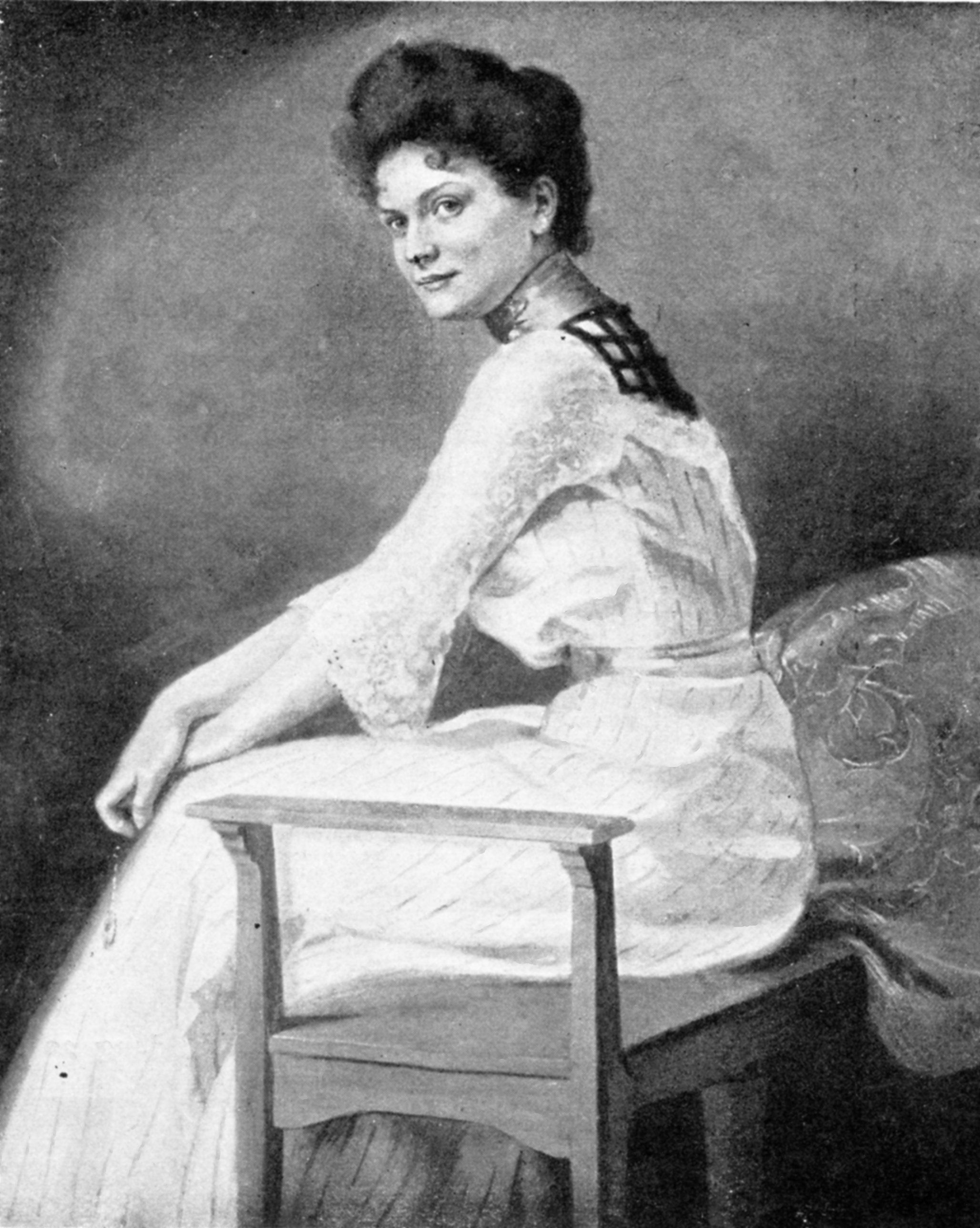 Gemälde "Damenbildnis" von Hans Wislicenus. Dargestellt ist wahrscheinlich seine Frau Lilli Wislicenus-Finzelberg; vergleiche